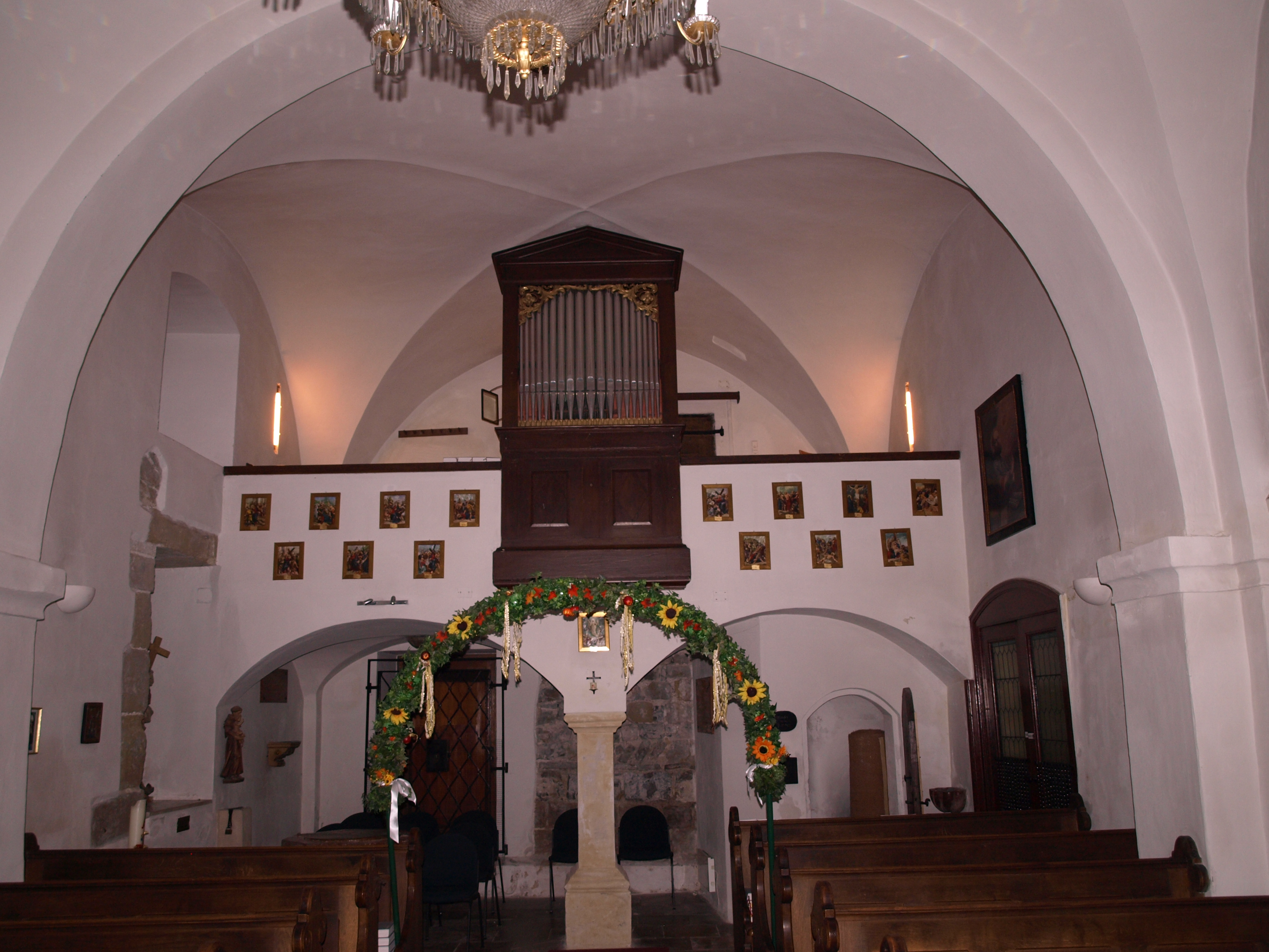 Sicht in richtung Westen mit der Ullmann-Orgel auf der Empore